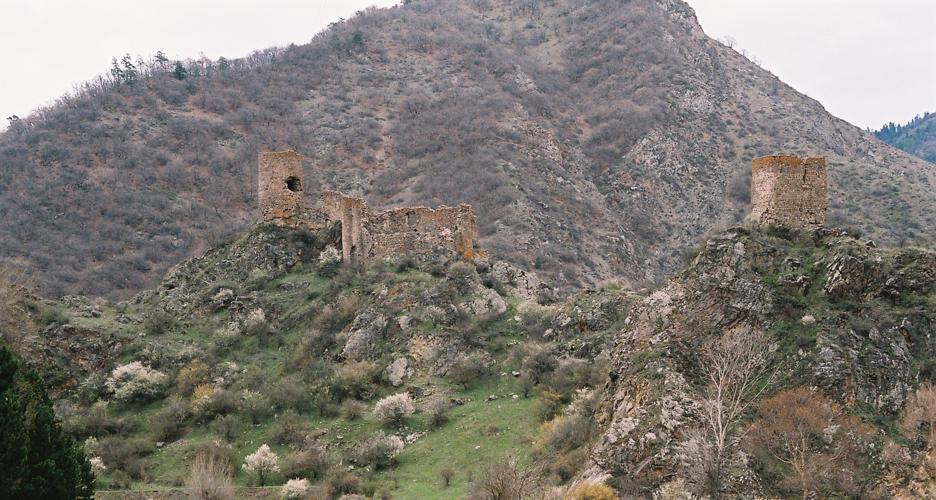 სლესა, ანუ მოქცევის ციხე.